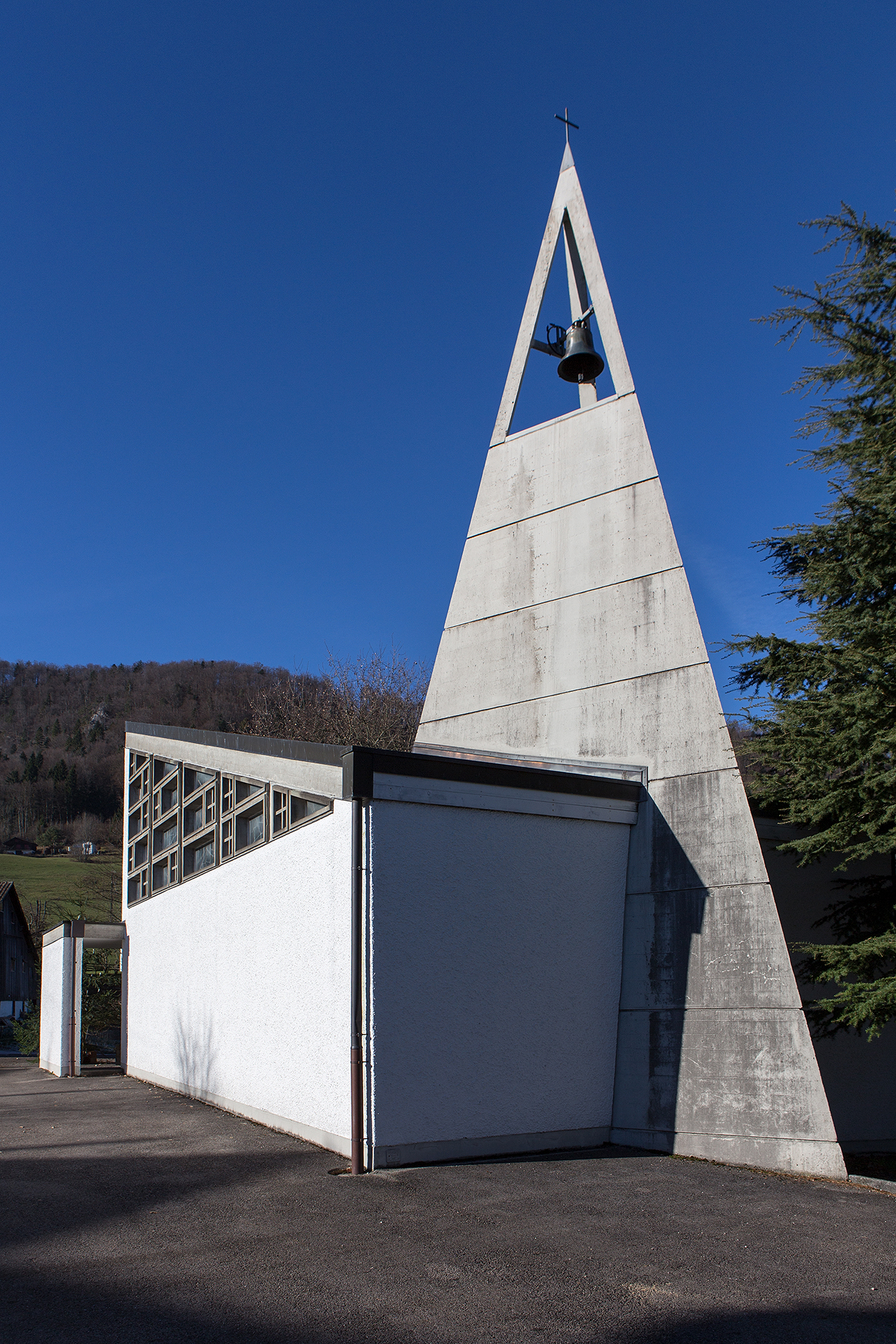 Kapelle in Vellerat (JU) Architektur: Jeanne Bueche